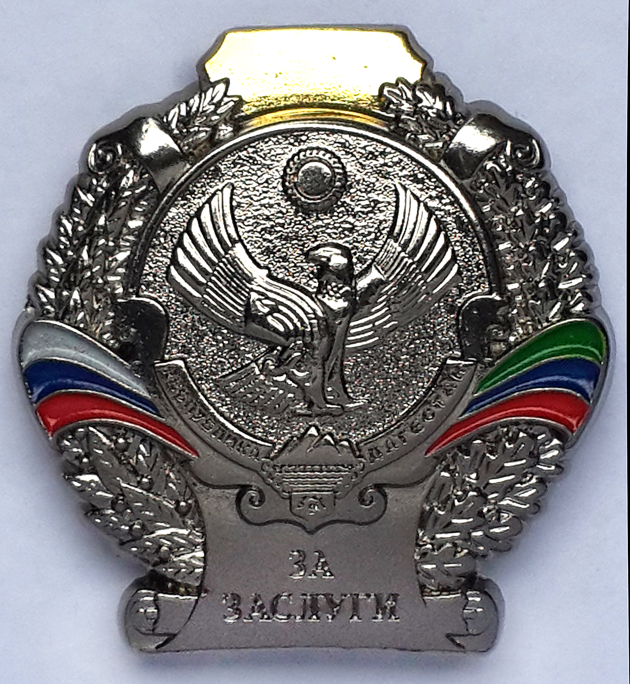 Заслуженный деятель искусств Республики Дагестан